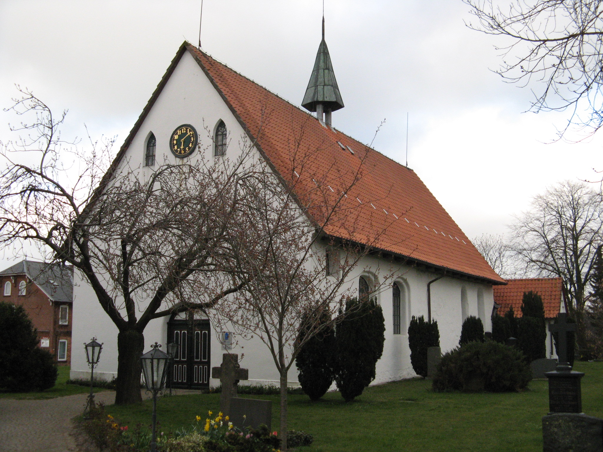 Sankt Marien-Magdalenen-Kirche in Erfde Author: Dirk Ingo Franke